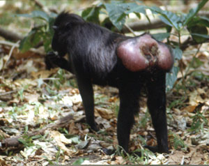 Macaca nigra. Femelle en oestrus. Photographie de Bernard Thierry avec son aimable autorisation.